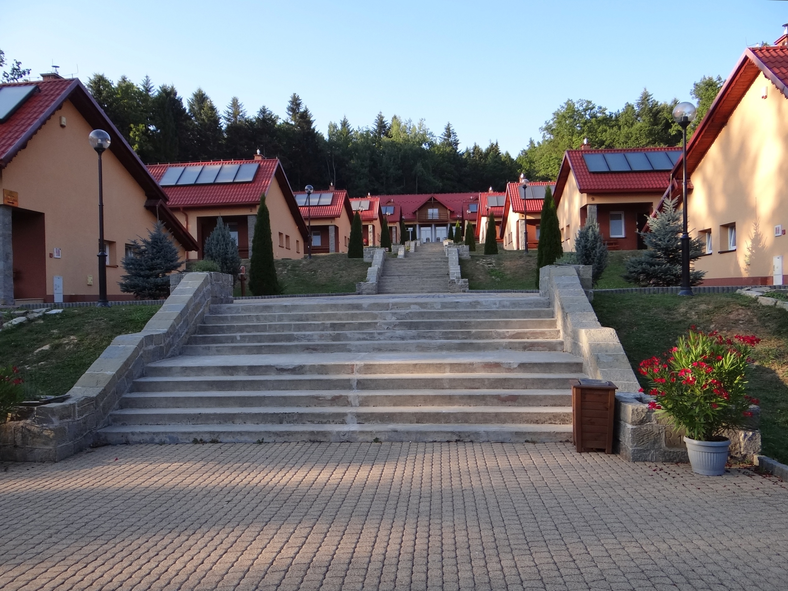 Ośrodek wypoczynkowo-rekolekcyjny w Zembrzycach